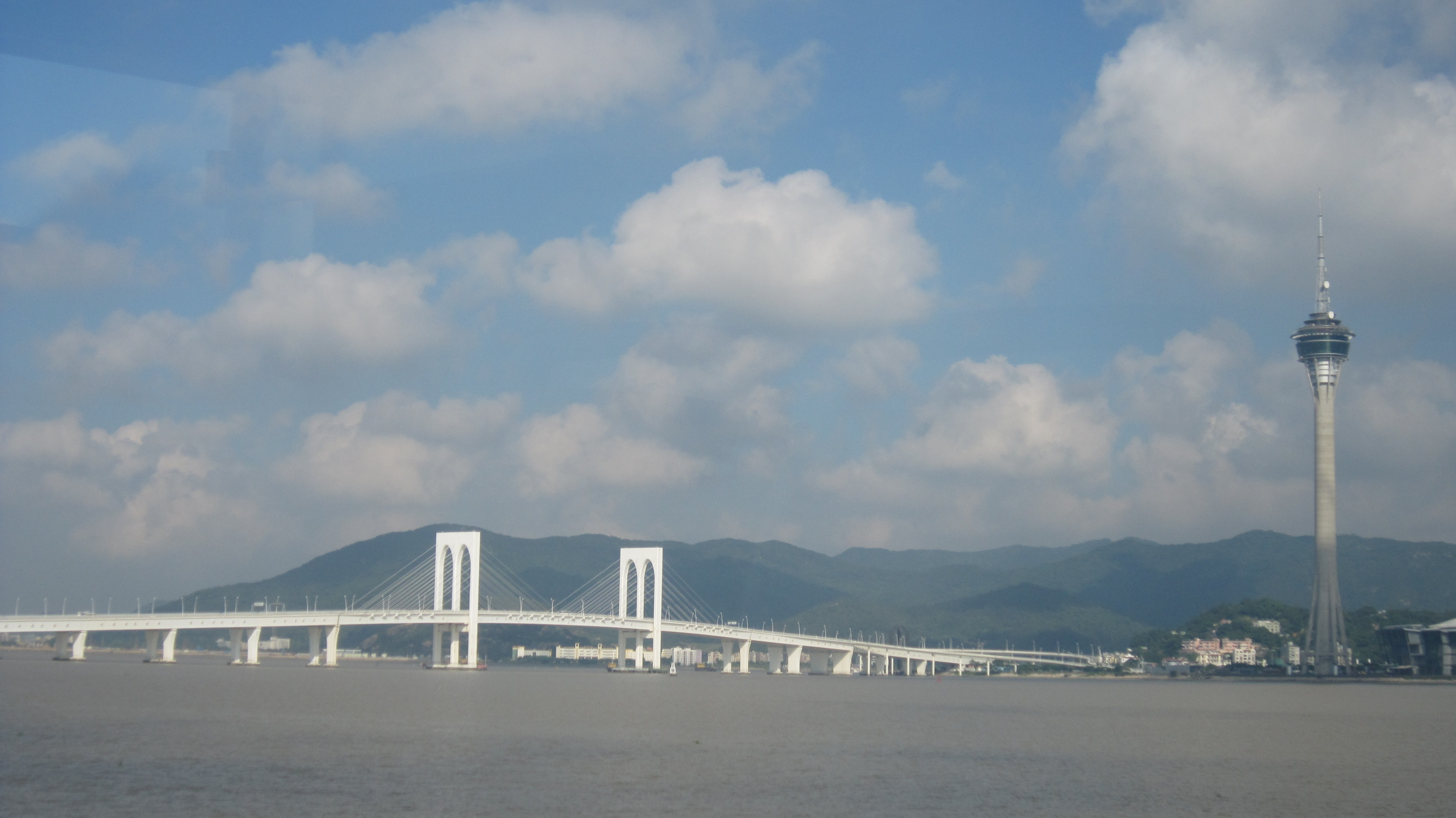 O Ponte de Sai Van e o Torre de Macau